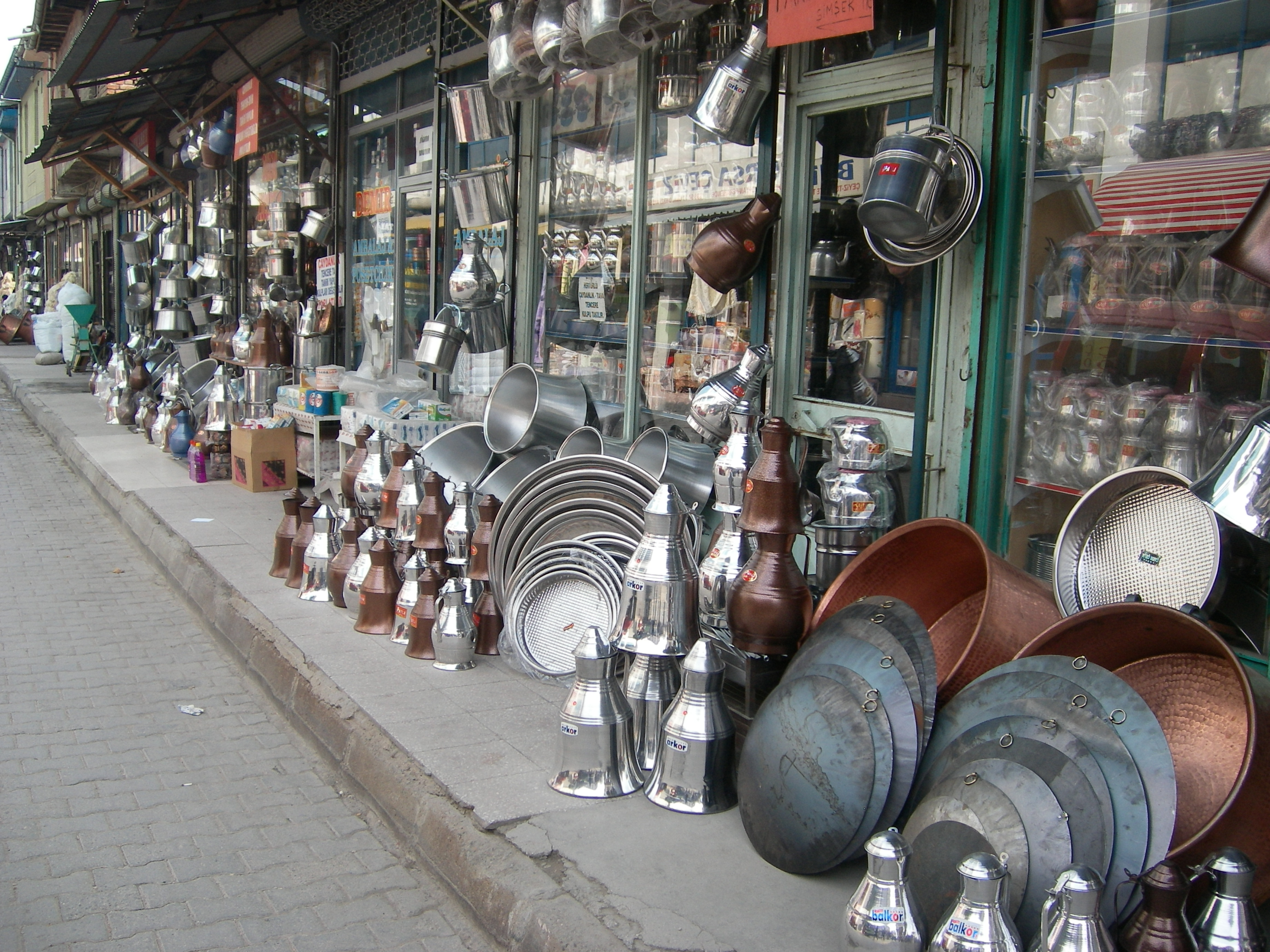 Elazığ'da çarşı